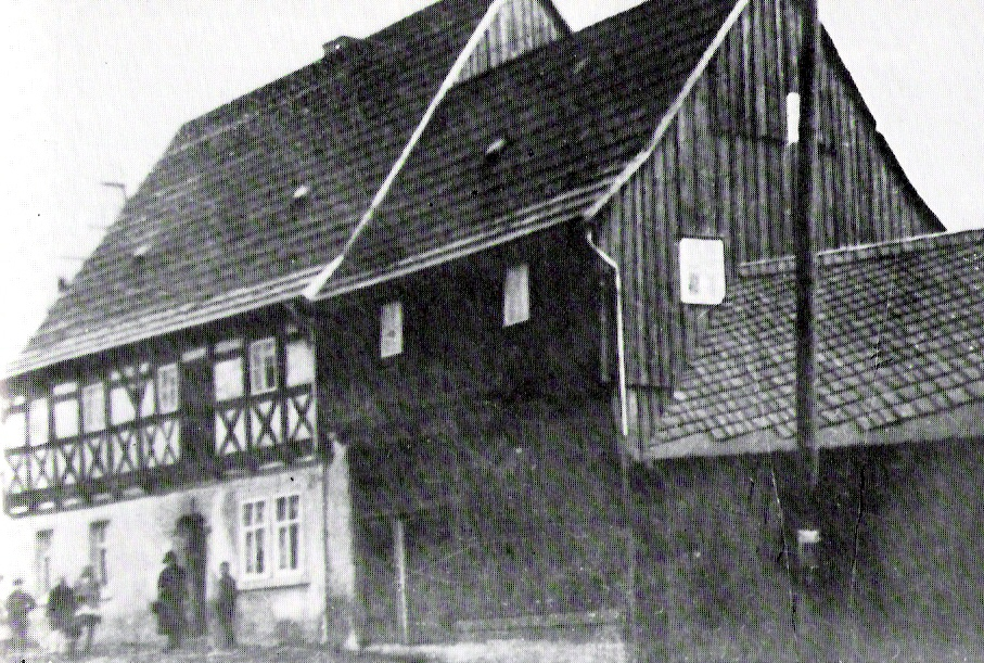 Wohnhaus Göthels mit Werkstatt in Borstendorf